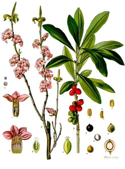 Seidelbast. A blühende, B fruchtende Pflanze in natürl. Grösse; 1 Blüthe im Längsschnitt, vergrössert; 2 Krone, ausgebreitet, desgl.; 3 Staubgefäss, desgl.; 4 Pollenkörner, desgl.; 5 Stempel, desgl.; 6 derselbe im Längsschnitt, desgl.; 7 Beere im Längsschnitt, desgl.; 8, 9, 10, 11 Same mit und ohne Häute, desgl.